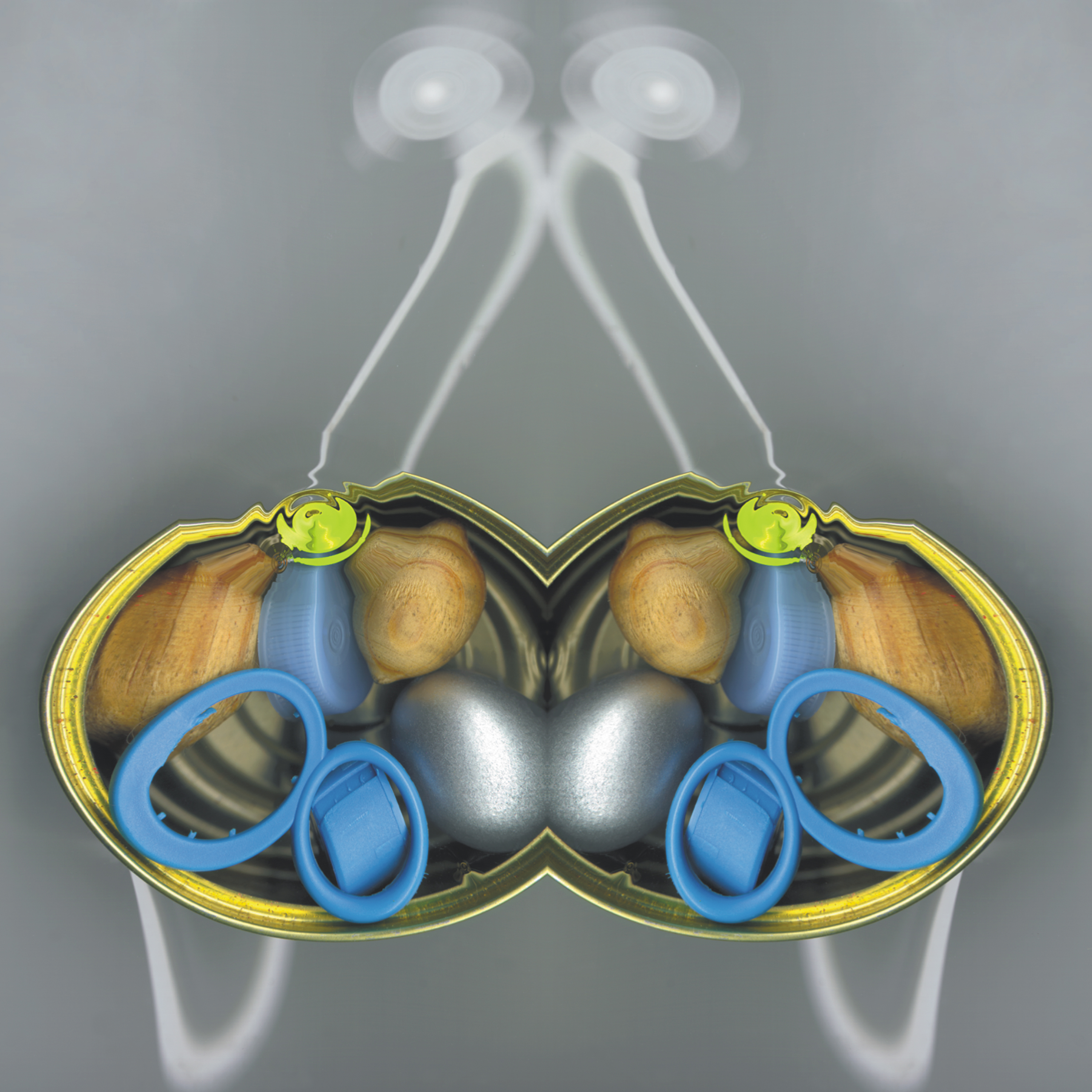 Geminis Ornamento Bezmilian